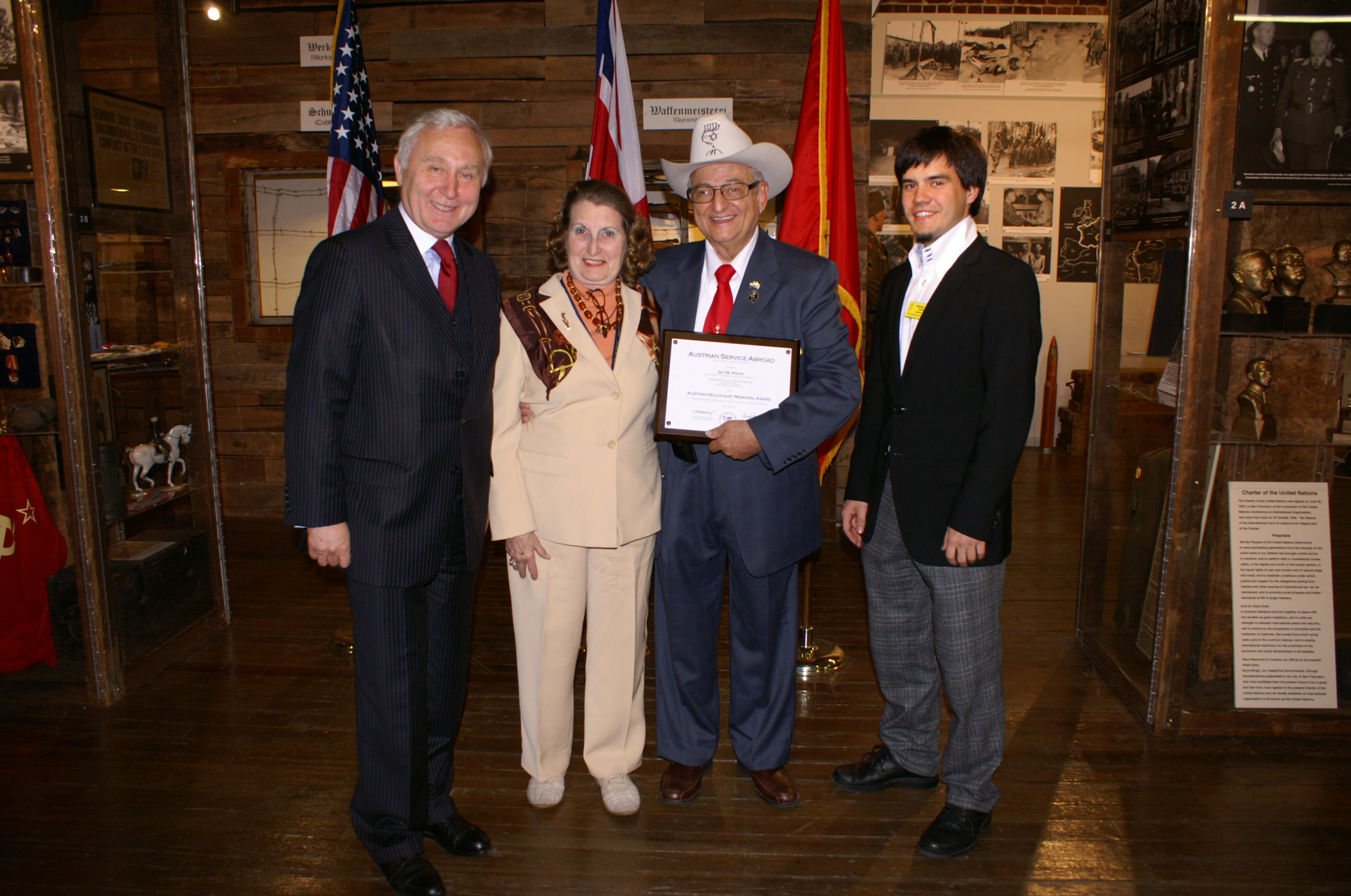 Überreichung des Austrian Holocaust Memorial Awards an Jay M. Ipson durch den Österreichischen Botschafter in den USA Christian Prosl.